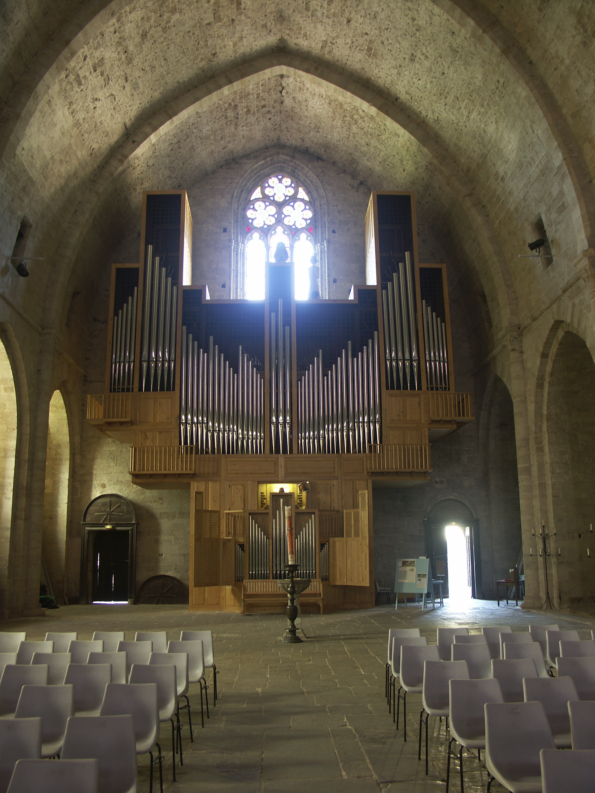 Abbaye de Sylvanès (Aveyron), les orgues.